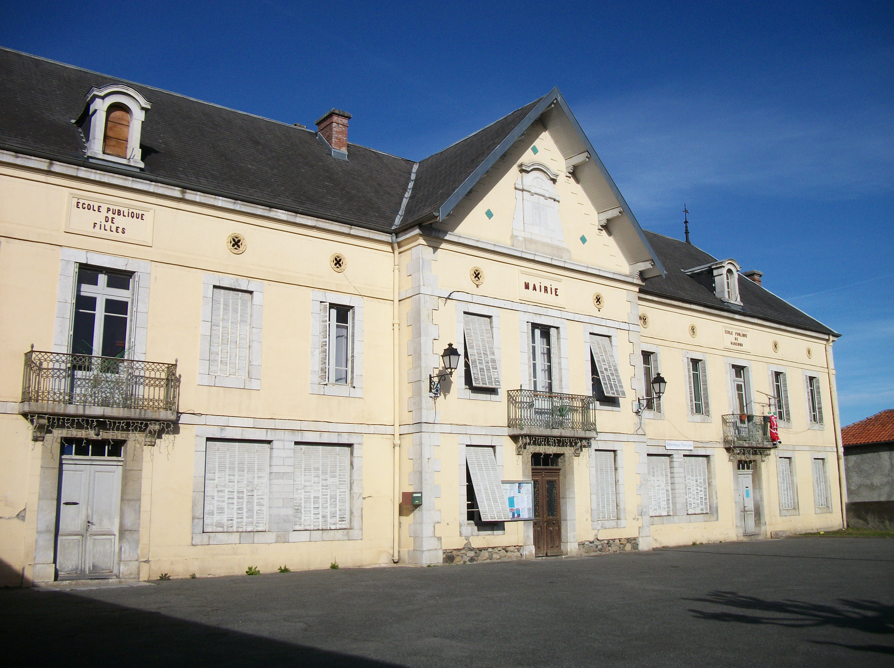 Mairie